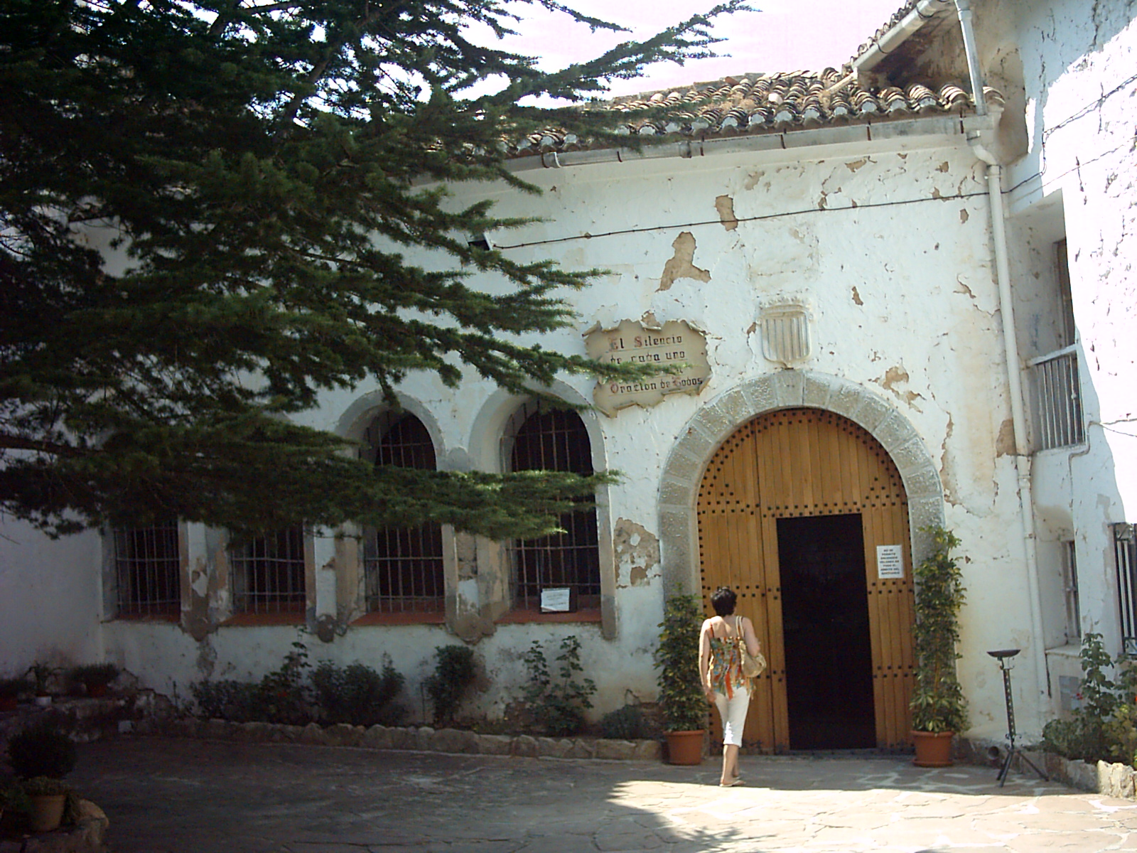 Santuari de la Cova Santa (Altura) 07.012-001.